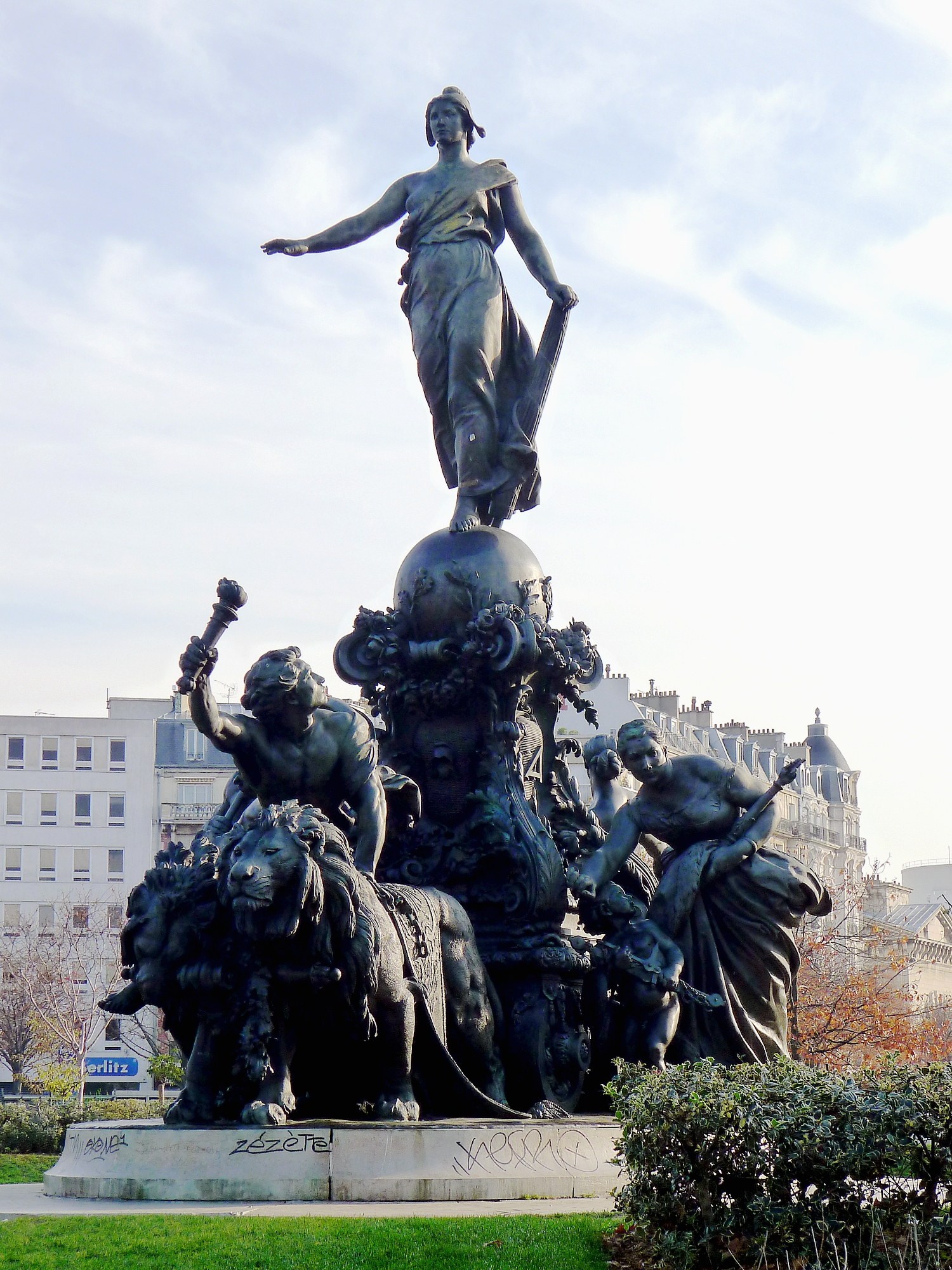 "Triomphe de la République" de Jules Dalou (place de la Nation) - Paris XI, XII et XX